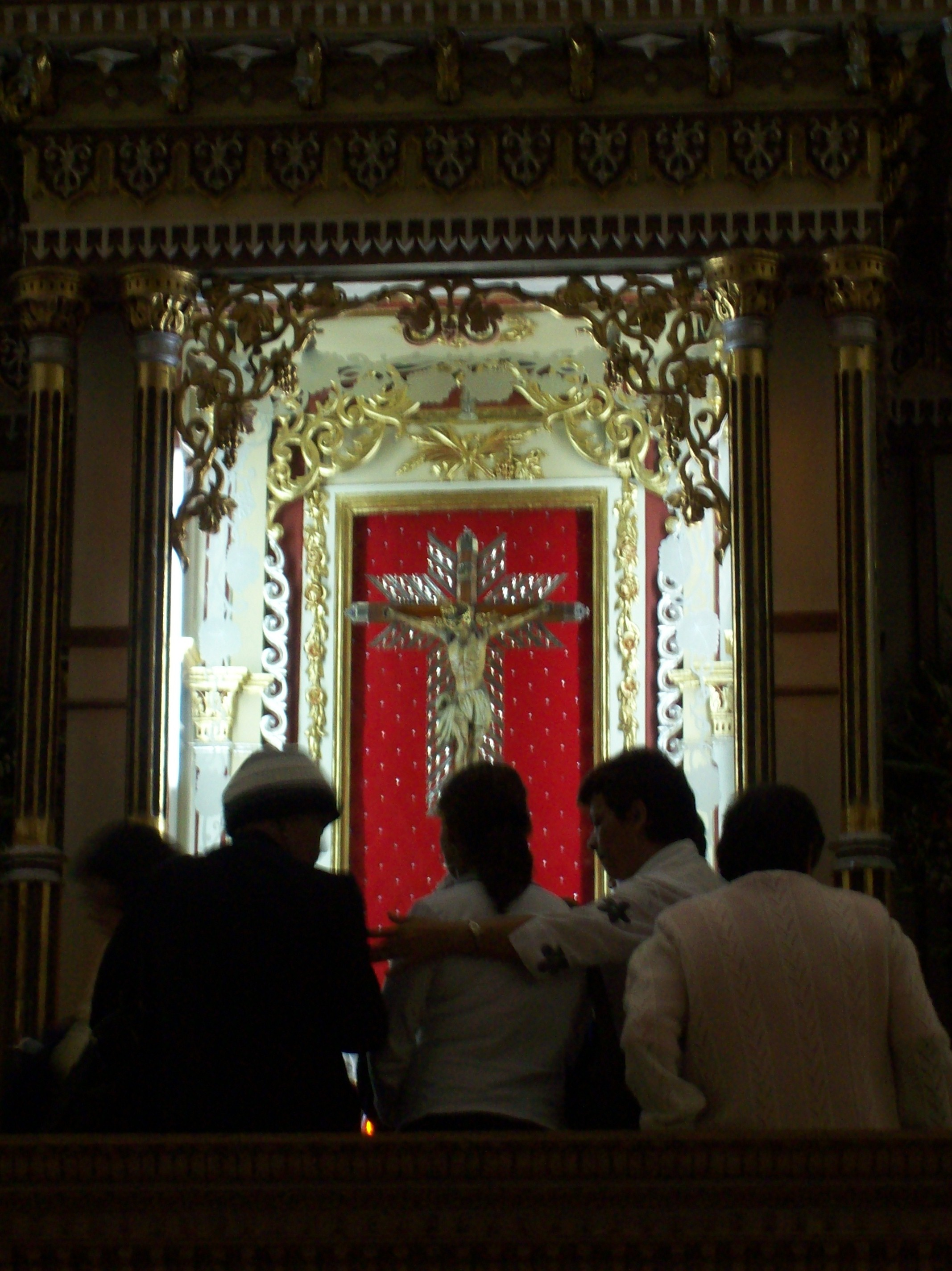 Imagen del Señor de los Milagros. Basílica Menor del Señor de los Milagros del municipio de San Pedro de los Milagros, Antioquia. Colombia.